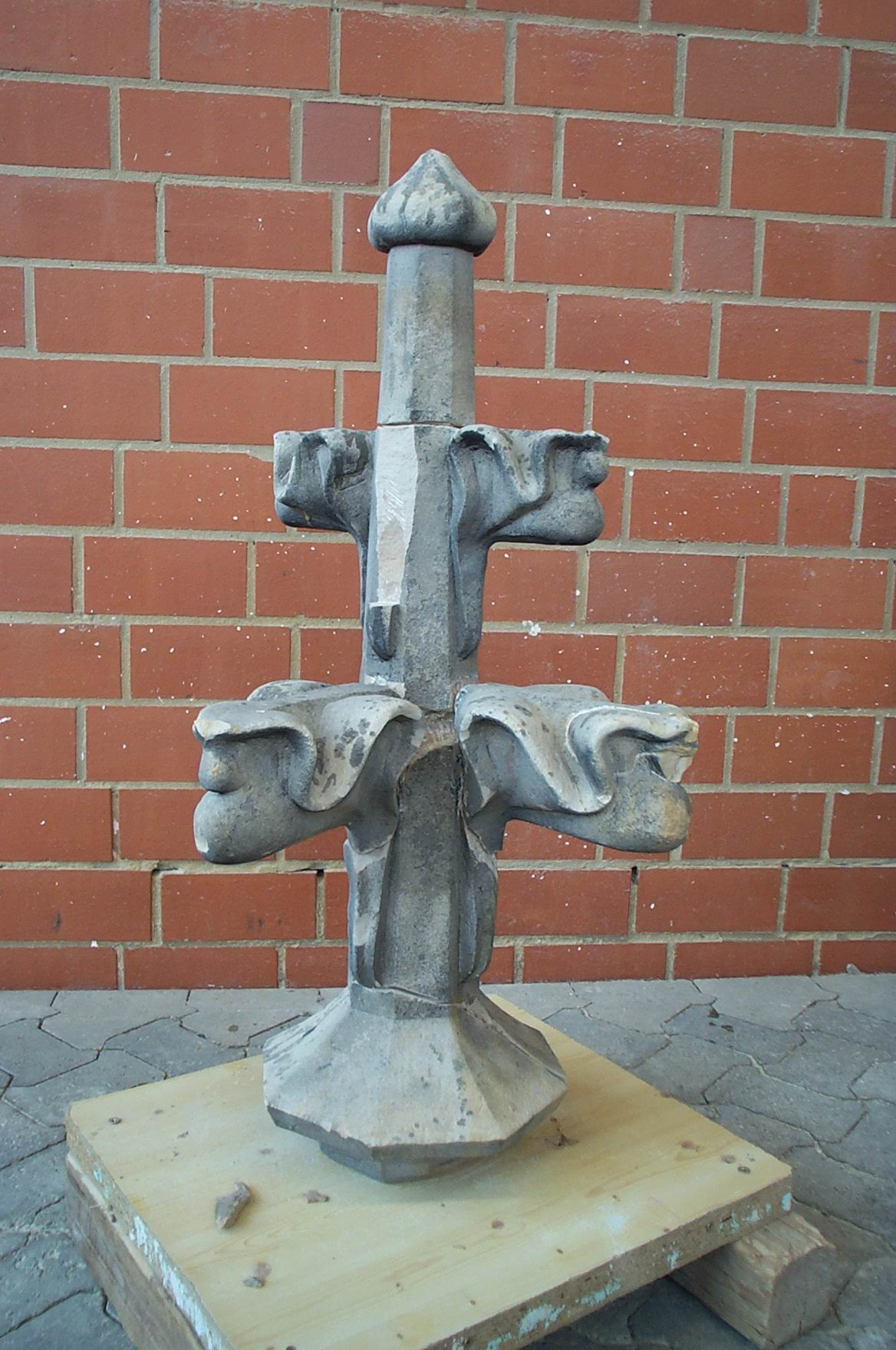 Kreuzblume